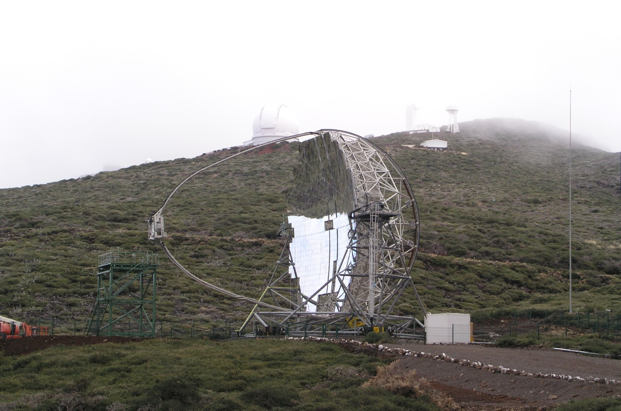 La Palma - Roque de los Muchachos - MAGIC Fotograf: Benutzer:TDLacoste